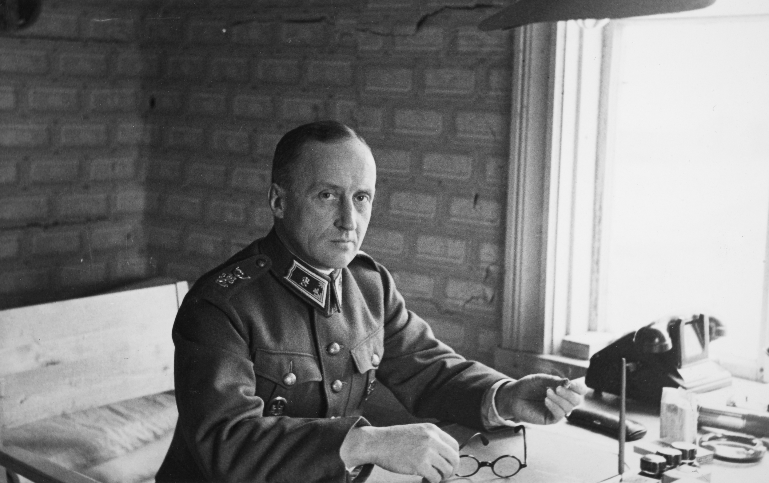 2. Divisioonan komentaja kenraalimajuri Aarne Blick.